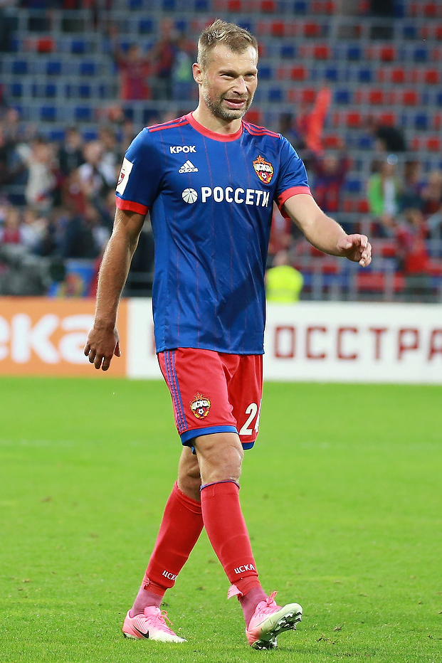 ЦСКА - «Ахмат»